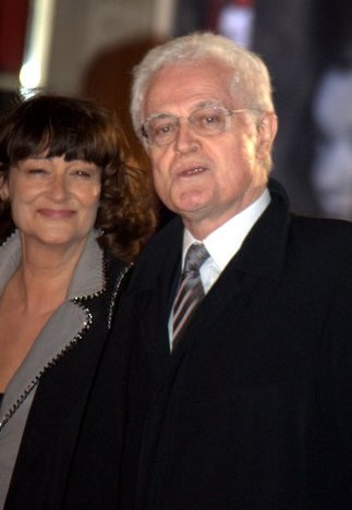 Sylviane Agacinski et Lionel Jospin à la cérémonie des César du cinéma.